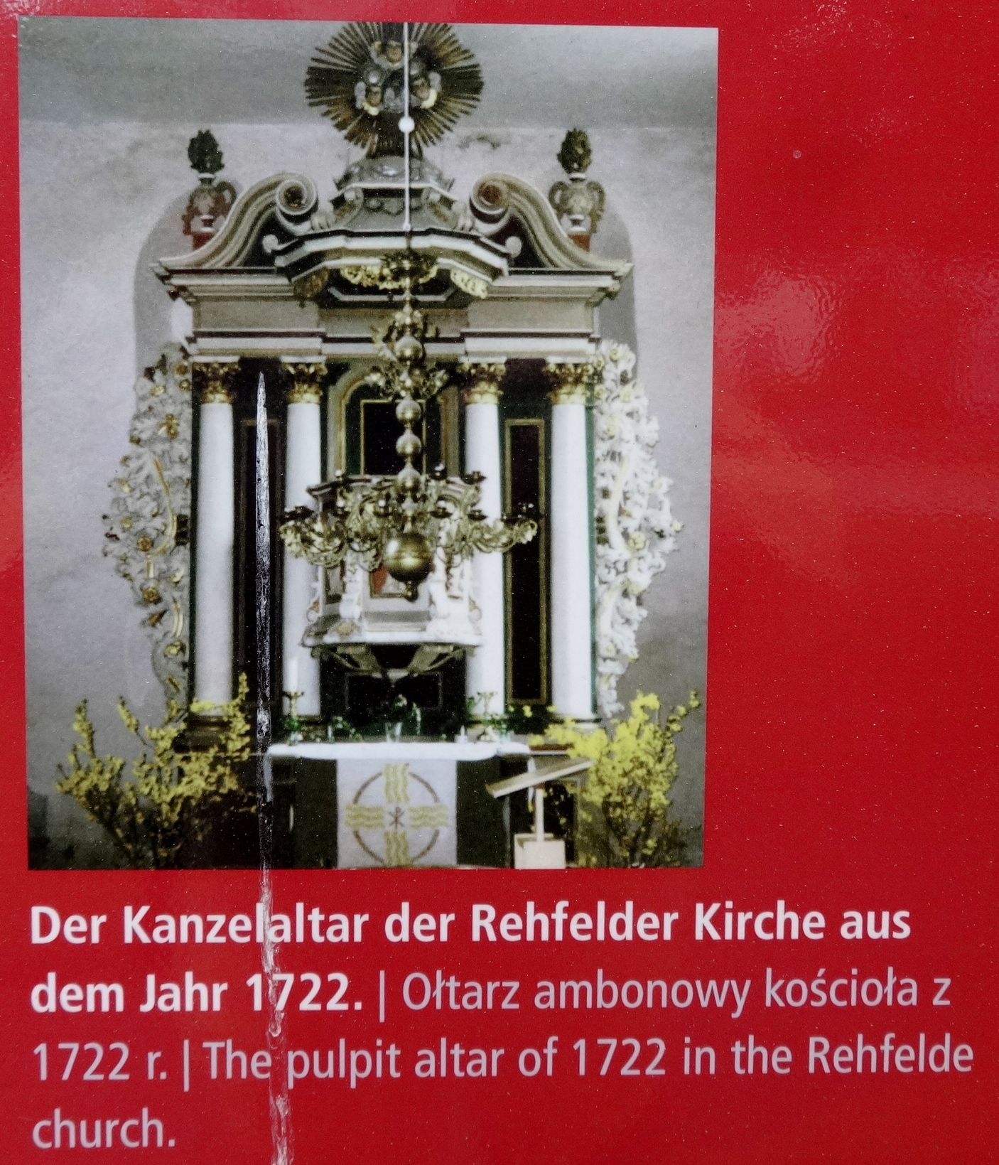 Kanzel-Altar der Kirche in Rehfelde-Dorf, aufgenommen auf einer öffentlich zugänglichen Informationstafel in Rehfelde-Dorf